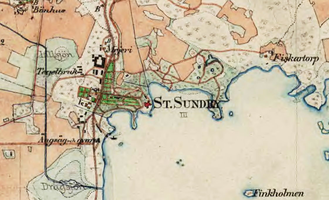 Stora Sundby slott med omgivning på 1890-talet